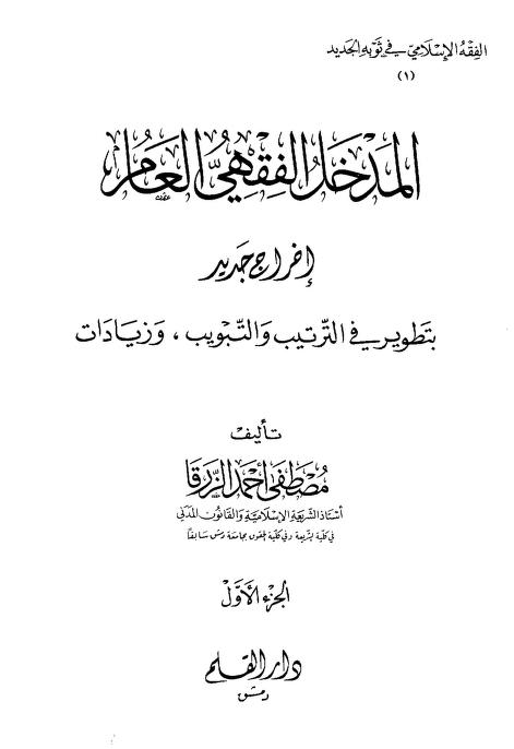 المدخل الفقهي العام - كتاب في دراسة الفقه بطريقة القانون